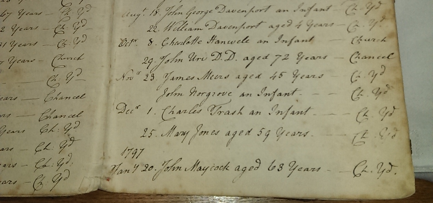 Oxfordshire History Centre, St. Lukes Church, Temple Rd, Oxford OX4 2HT, United Kingdom